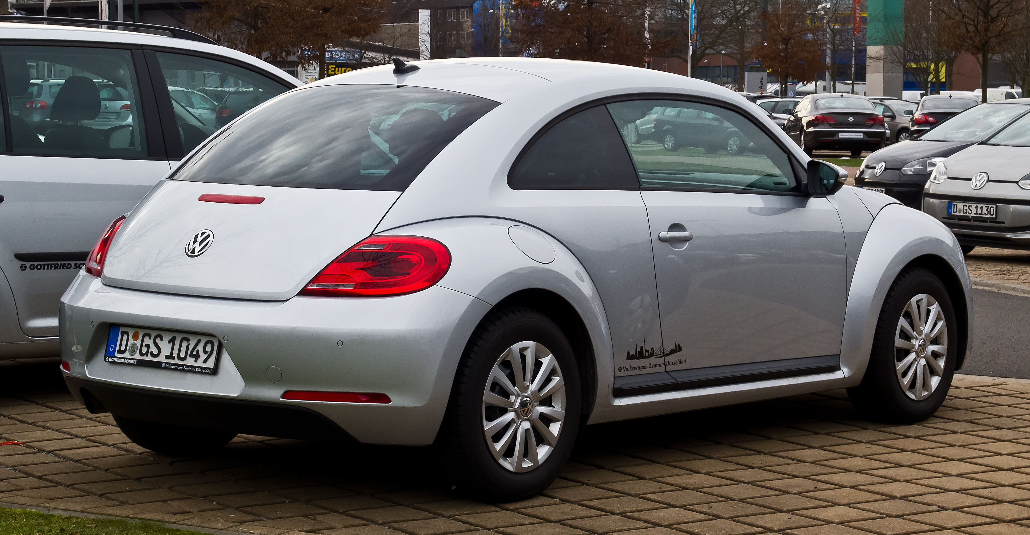 VW Beetle